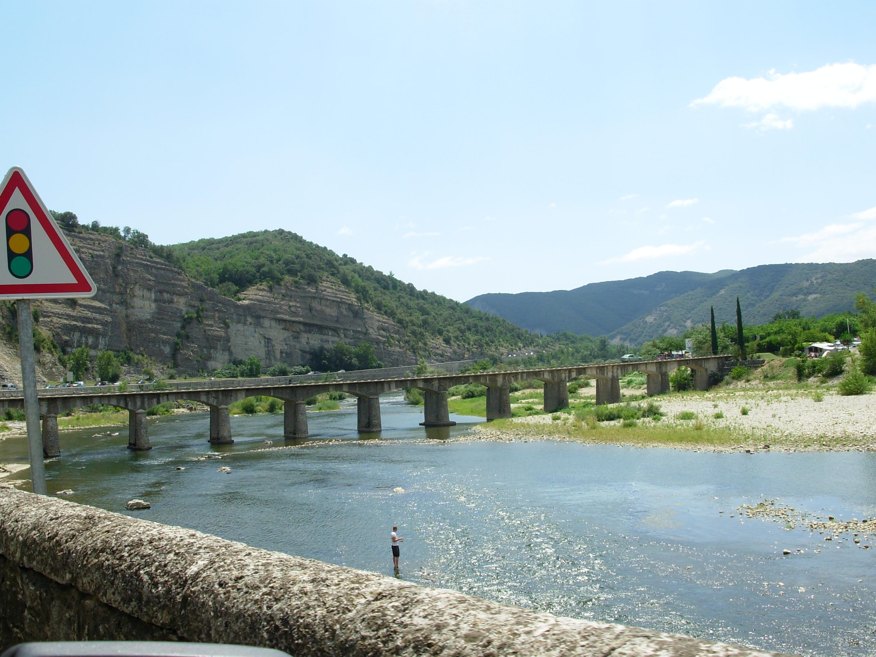 Sampzon (Ardèche) : pont routier sur l'Ardèche (rivière)